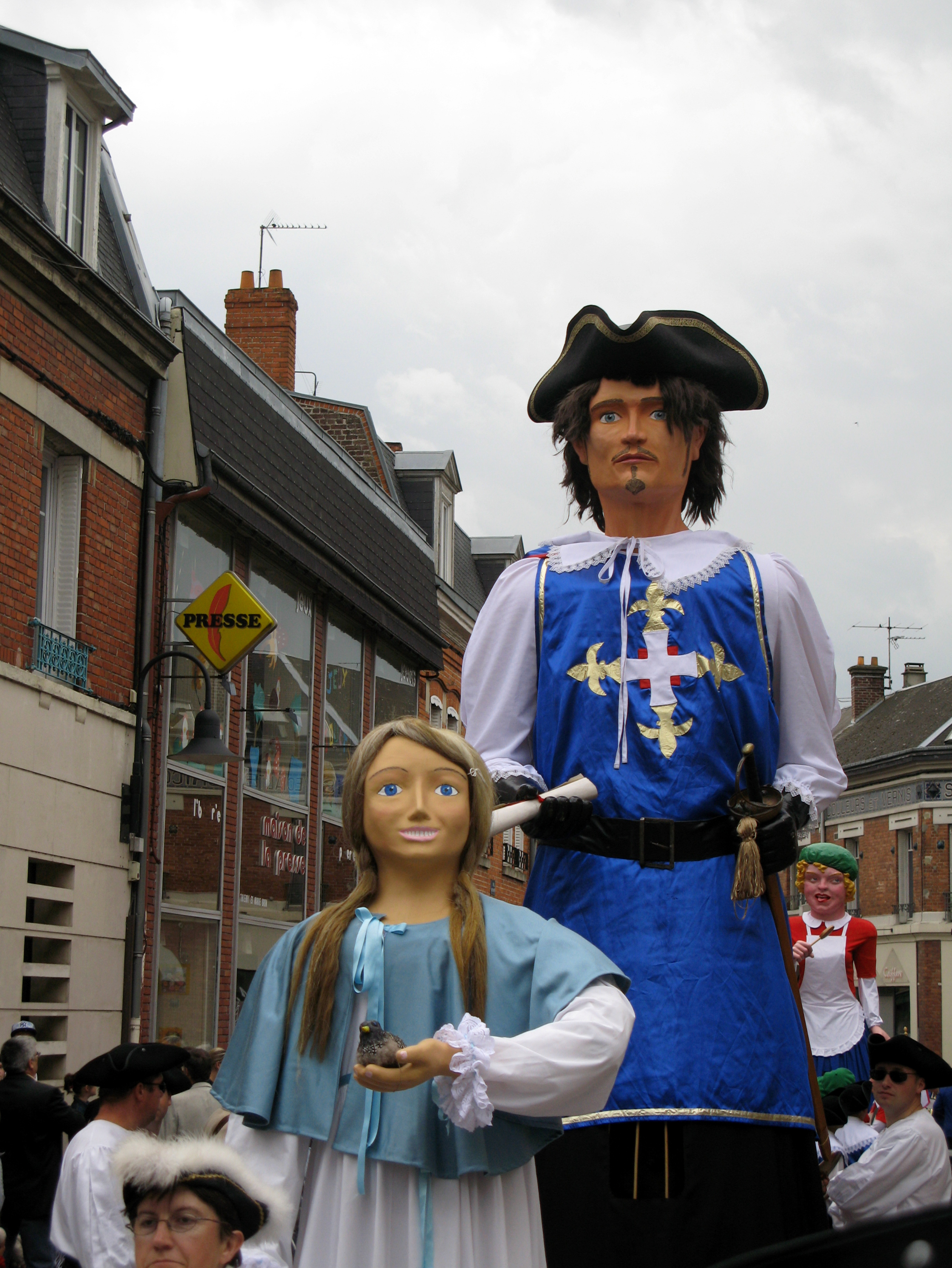 Ham (Somme, France) - Animation festive au centre-ville, un dimanche de printemps. Les géants Thomas le Mousquetaire et Adélaïde, dans la rue du Général Foy. Plus au fond, on reconnaît le béret vert et le T-shirt rouge d'un troisième géant, Miss Cantine.